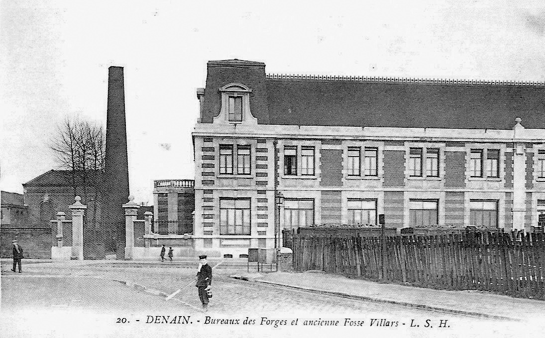 La fosse Villars de la Compagnie des mines d'Anzin était un charbonnage constitué de deux puits situé à Denain, Nord, Nord-Pas-de-Calais, France.